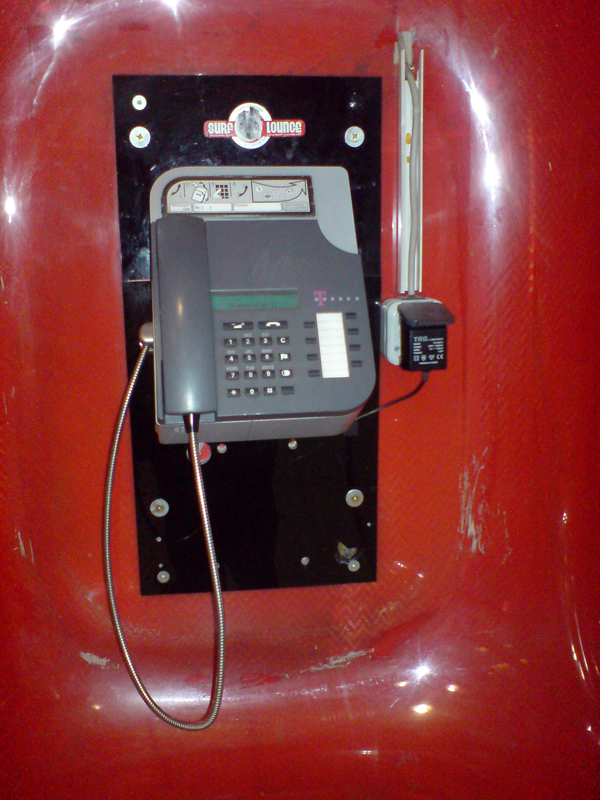 Clubtelefon 11 in einer Telefonhaube montiert, welche sich in einem Einkaufszentrum befindet